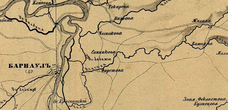 Деревня Санникова и ближайшие населённые пункты. Фрагмент топографической карты Алтайского горного округа (1864 г.). Карта составлена инженером полковником межевого корпуса Ф. Мейном. Была издана в картографическом заведении А. Ильина (первом специализированном картографическом предприятии в России) в 1868 году.